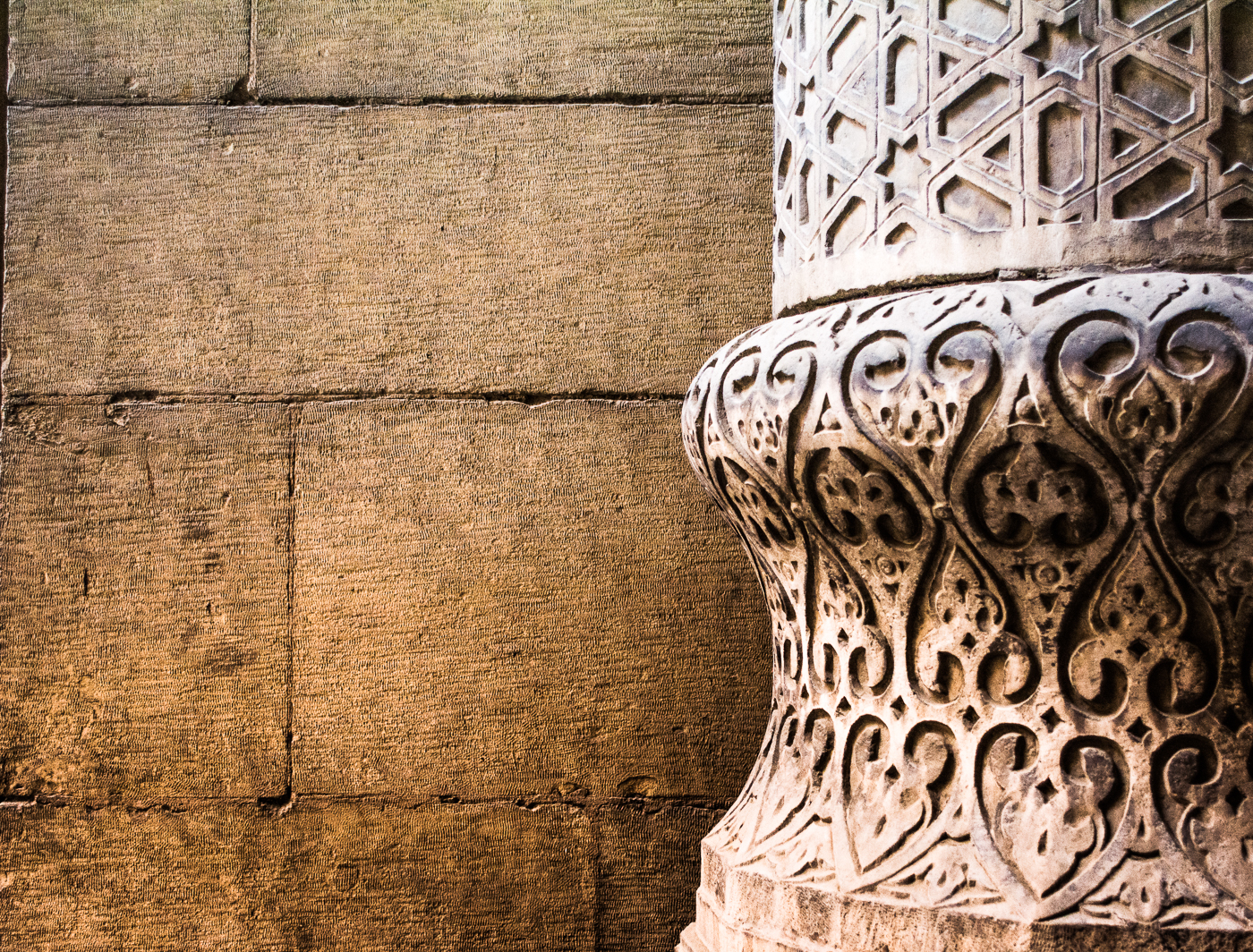 مسجد الرفاعي أحد مساجد القاهرة الأثريّة، شيد عام 1329 هجرية الموافق لعام 1911 ميلادية. سمي بذلك الاسم نسبة إلى (أحمد عز الدين الصياد الرفاعي) أحد أحفاد الإمام أحمد الرفاعي الذي ولد بالعراق وسافر لمصر وتزوج فيها من فتاة من سلالة الملك الأفضل ابن صلاح الدين الايوبي فأعقب منه السيد علي ابي الشباك. ويتميز المسجد التفاصيل الدقيقة في الزخارف على الحوائط الخارجية والعمدان العملاقة عند البوابة الخارجية. وكانت والدة الخديوي إسماعيل هي أكثر من أراد بناء هذا المسجد. وقد استمر بناء هذا المسجد 40 عام. و يحتوي مسجد الرفاعي على العديد من مقابر أكثر أفراد الأسر الحاكمة في مصر لهذا أصرت خوشيار هانم والدة الخيديوي إسماعيل على بنائه وكلفت أكبر مهندسي مصر (في وقته) حسين فهمي باشا بتصميمه.